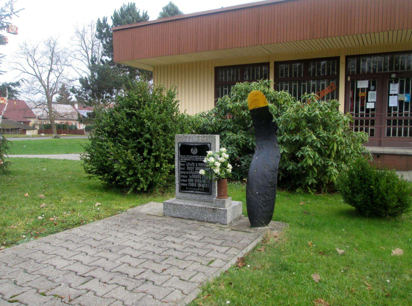 Pomník amerických letců v Čeminech. Letci byli 25. dubna 1945 zasažení v B-17G Checkerboard Fort s.n. 43-38369 při náletu na Plzeň a dopadli nedaleko Čemin. Foto pochází ze serveru Drobné památky.